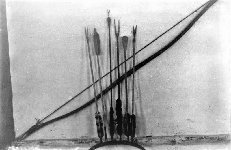 Hantide vibu ja nooled aastast 1912.